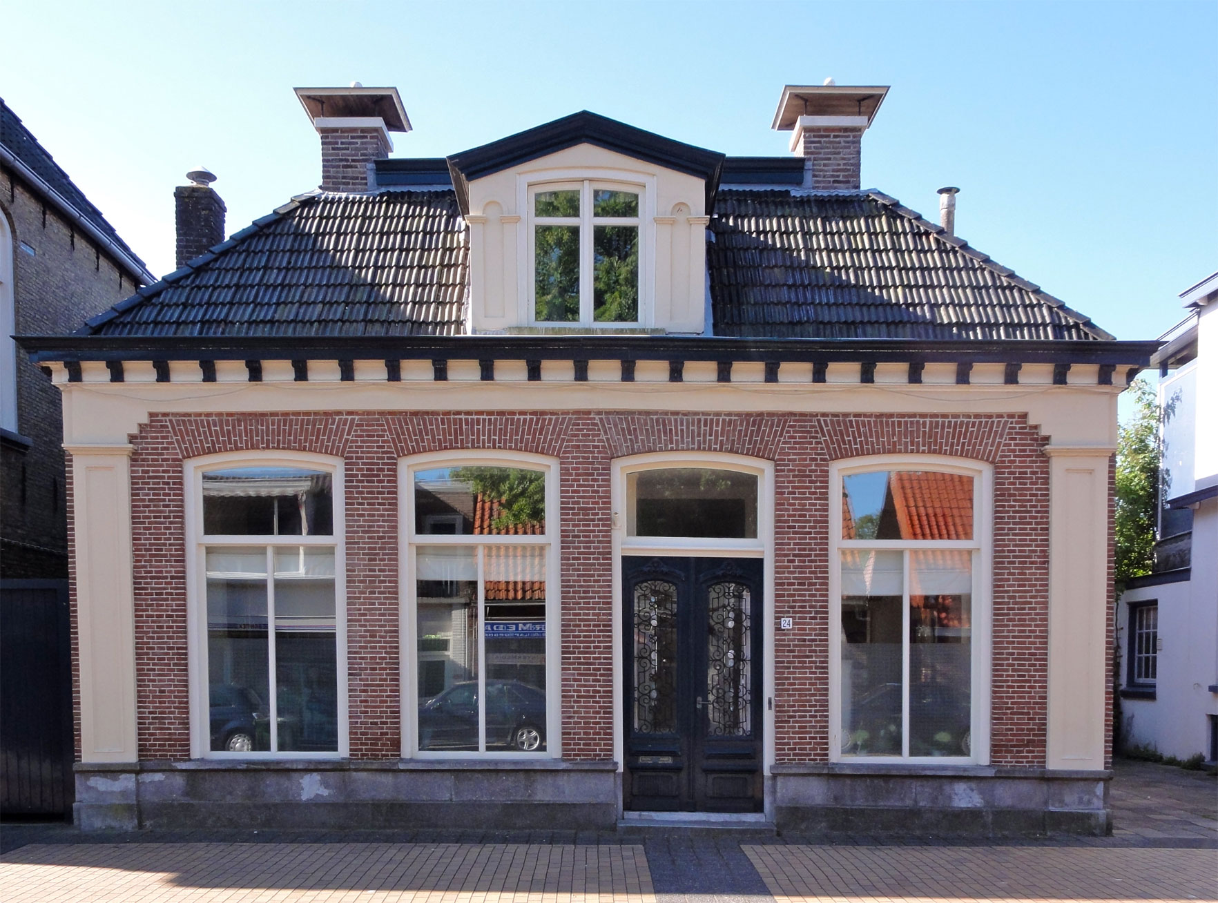 Van_Harenstraat 24 in Sint-Annaparochie